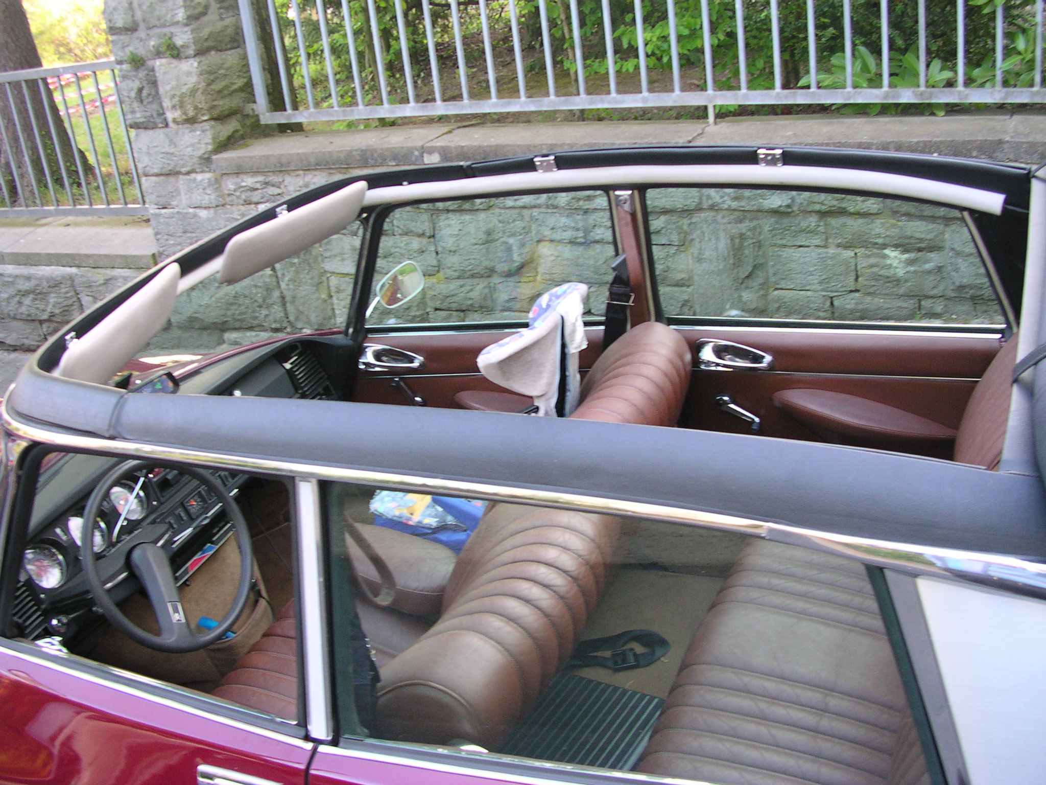 Citroën DS Cabrio mit 4 Türen, gesehen in Wiesbaden